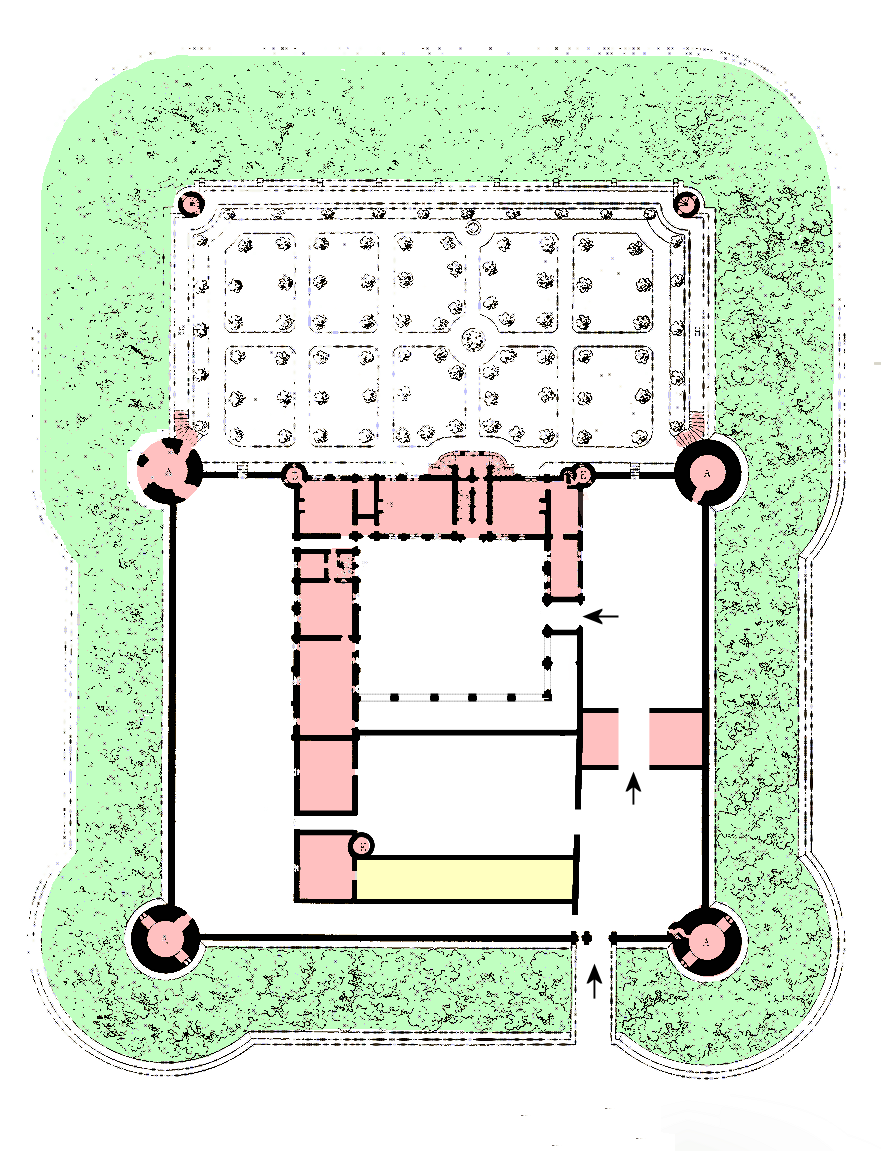 Plan hypothétique simplifié du château vers 1535